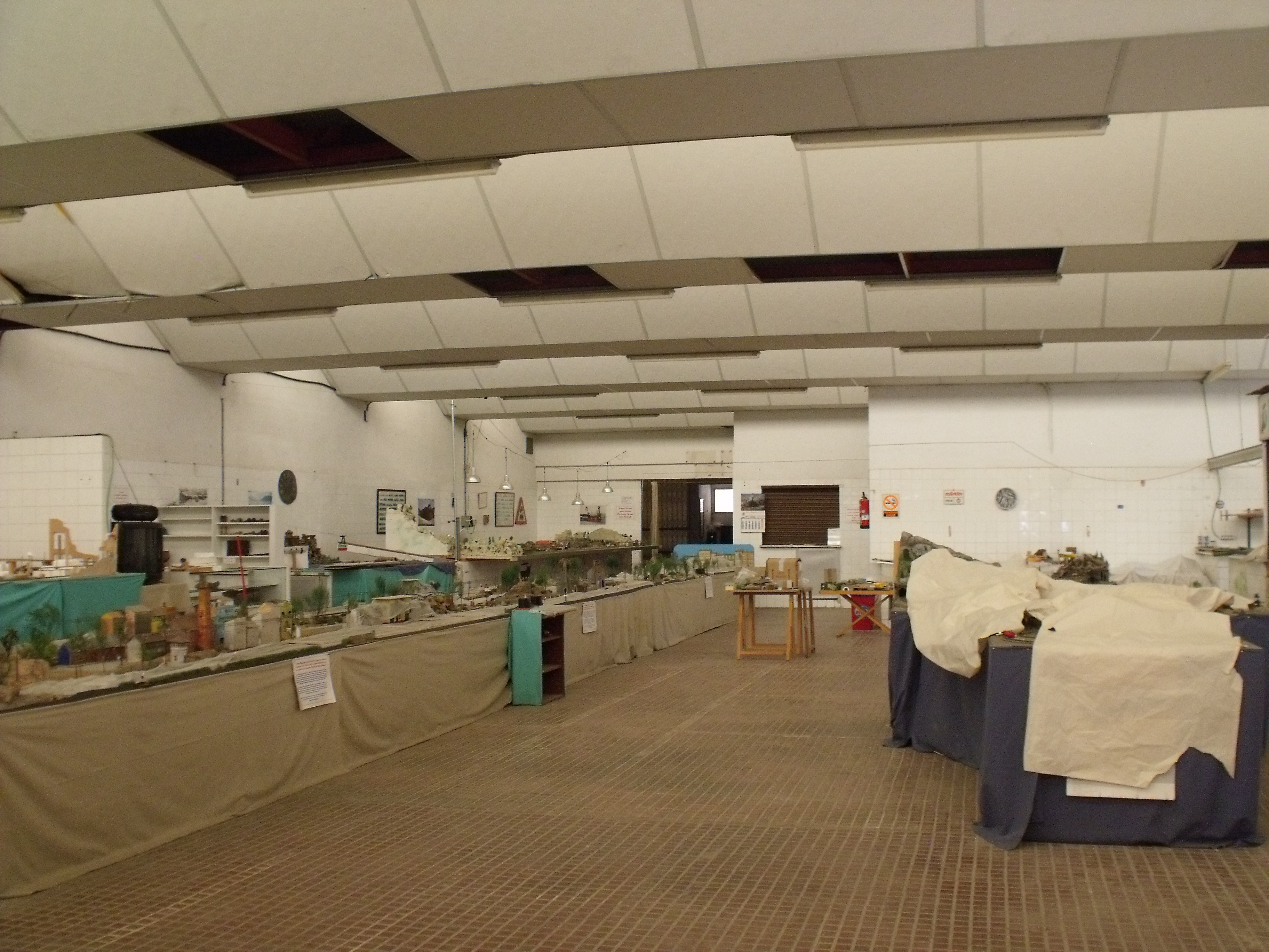 Sede de la Associació Ferroviària de Godella en el antiguo mercado de la localidad.